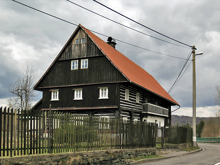 Venkovská usedlost, Valkeřice 113, Valkeřice.